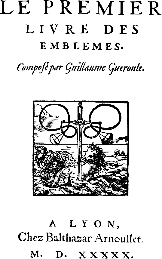 Woodcut for Guillaume Guéroult's Emblesmes